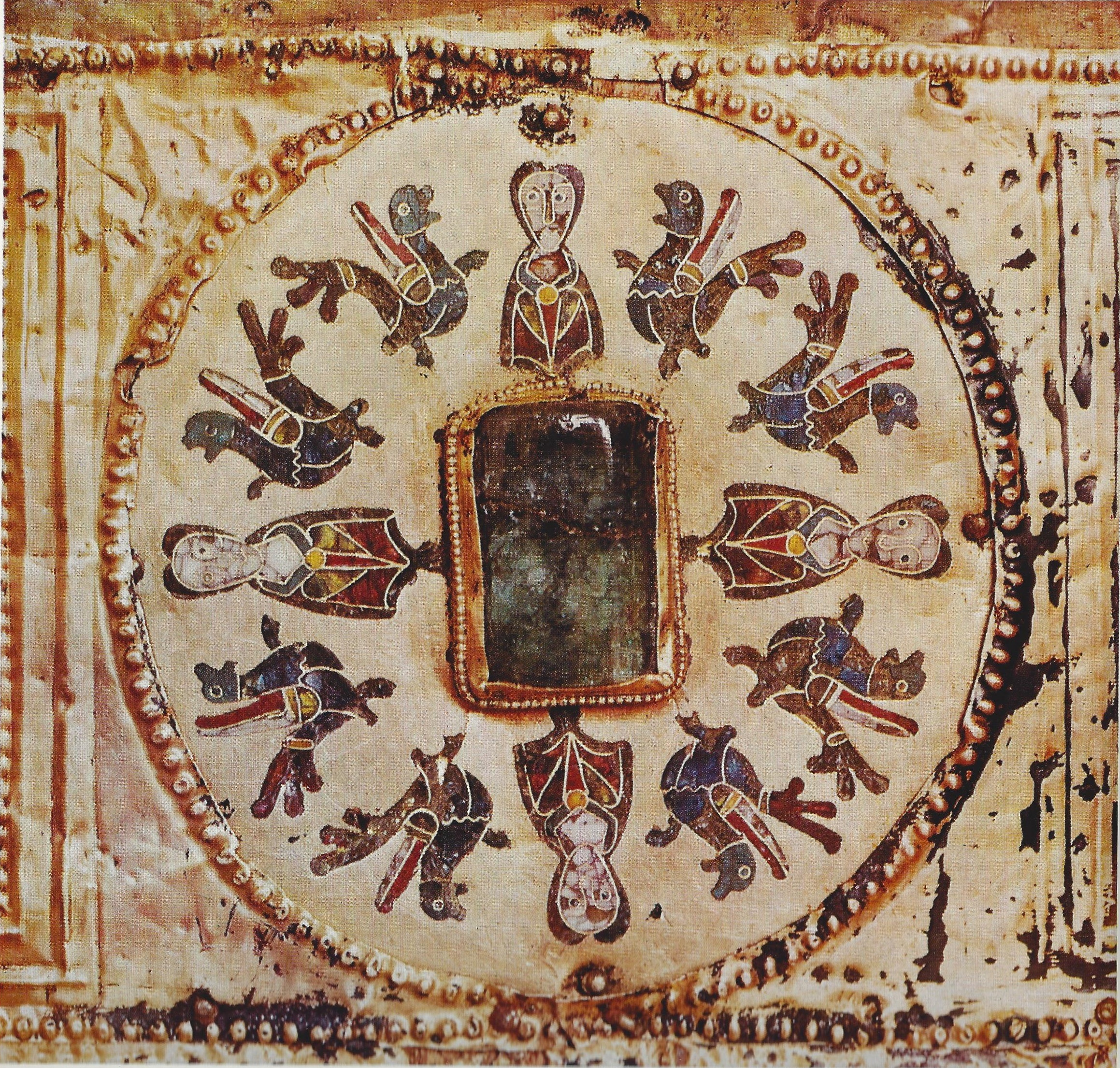 Medaillon von romanischem Reliquienschrein im Mindener Domschatz